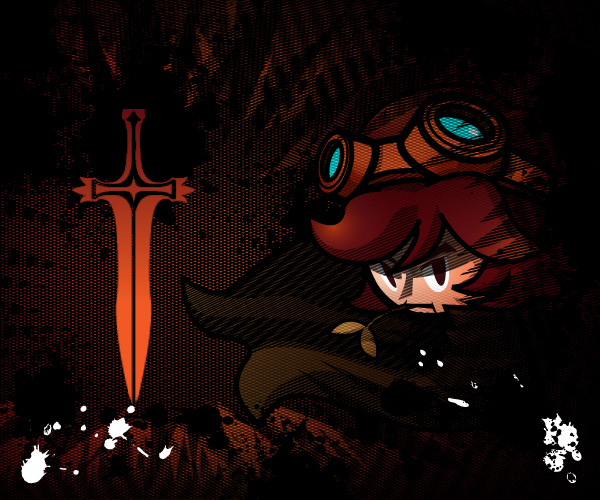 光暈戰記－第三勢力傭兵